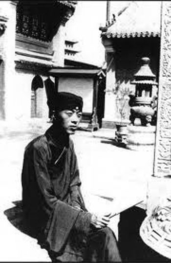 蟠桃宫道士